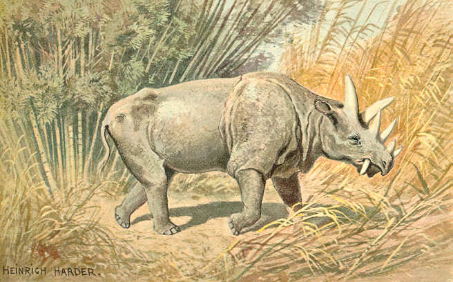 Dinoceras